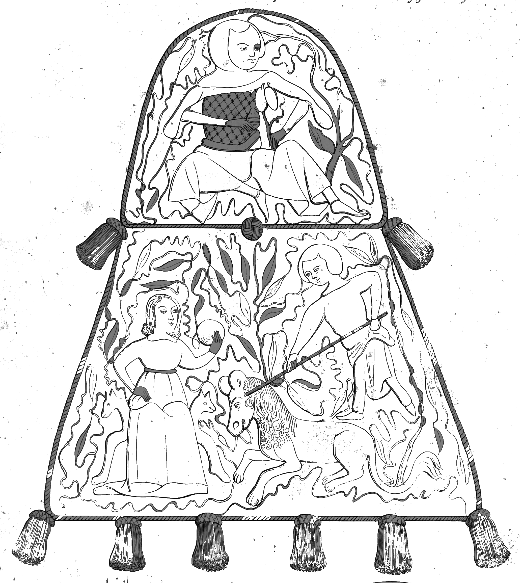 dessin de l'Aumonière d' Henri le Large.